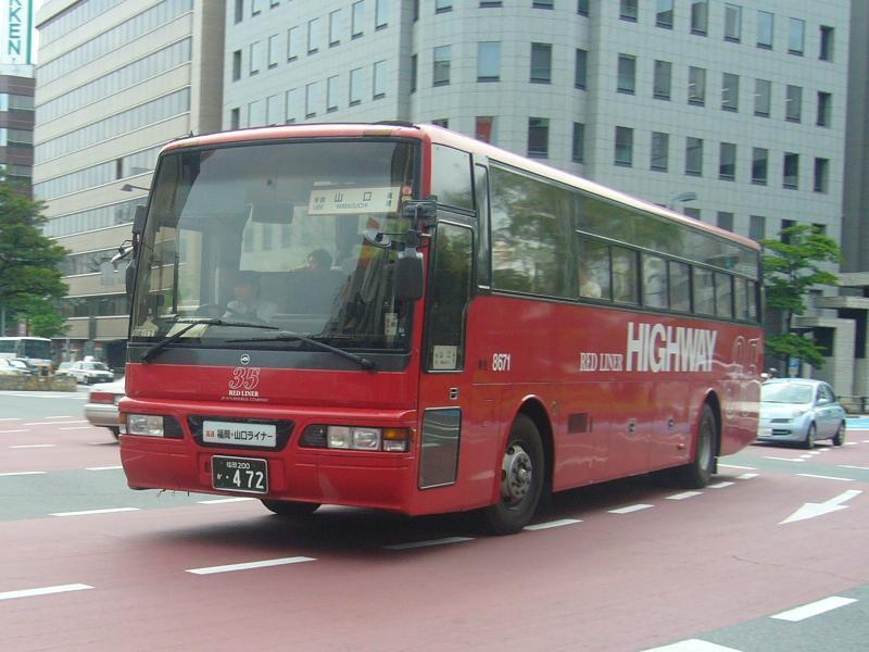 登録番号 福岡200か・472 ジェイアール九州バス(JR Kyushu bus)所属 車番8671 福岡・山口ライナー(Fukuoka Yamaguchi liner)用